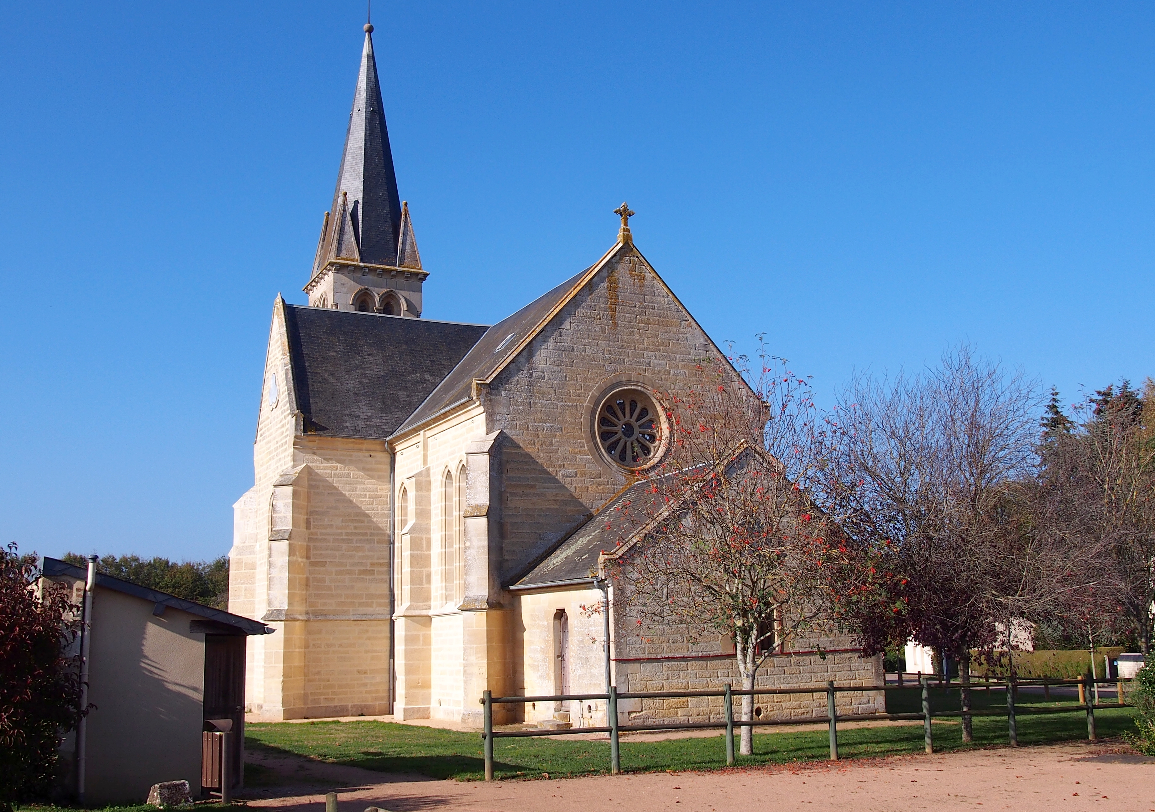 Batilly (Normandie, France). L'église Saint-Martin.